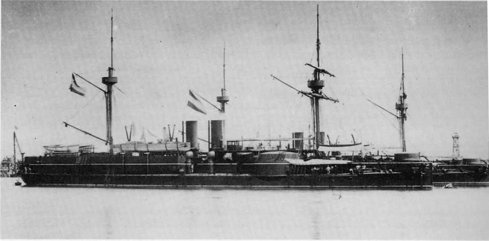 Фотография броненосцев "Динъюань" и "Чжэньюань"